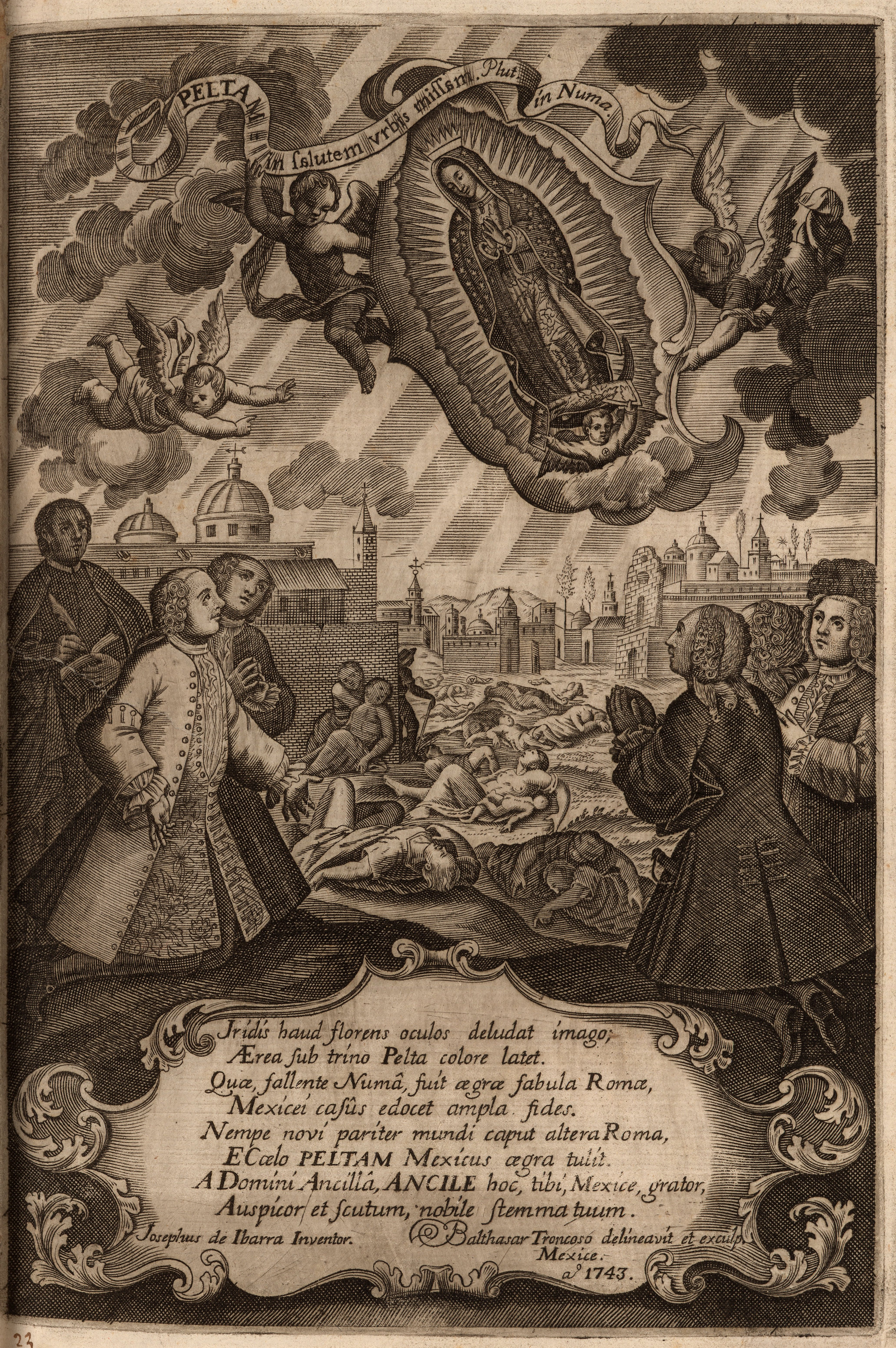 Dibujo previo para el frontispicio del Escudo de Armas de México, realizado alrededor de 1743 por el artista novohispano José de Ibarra. Incluido en el libro de Paula Mues, se trata del primer bosquejo que se tiene de una pintura de ese periodo.